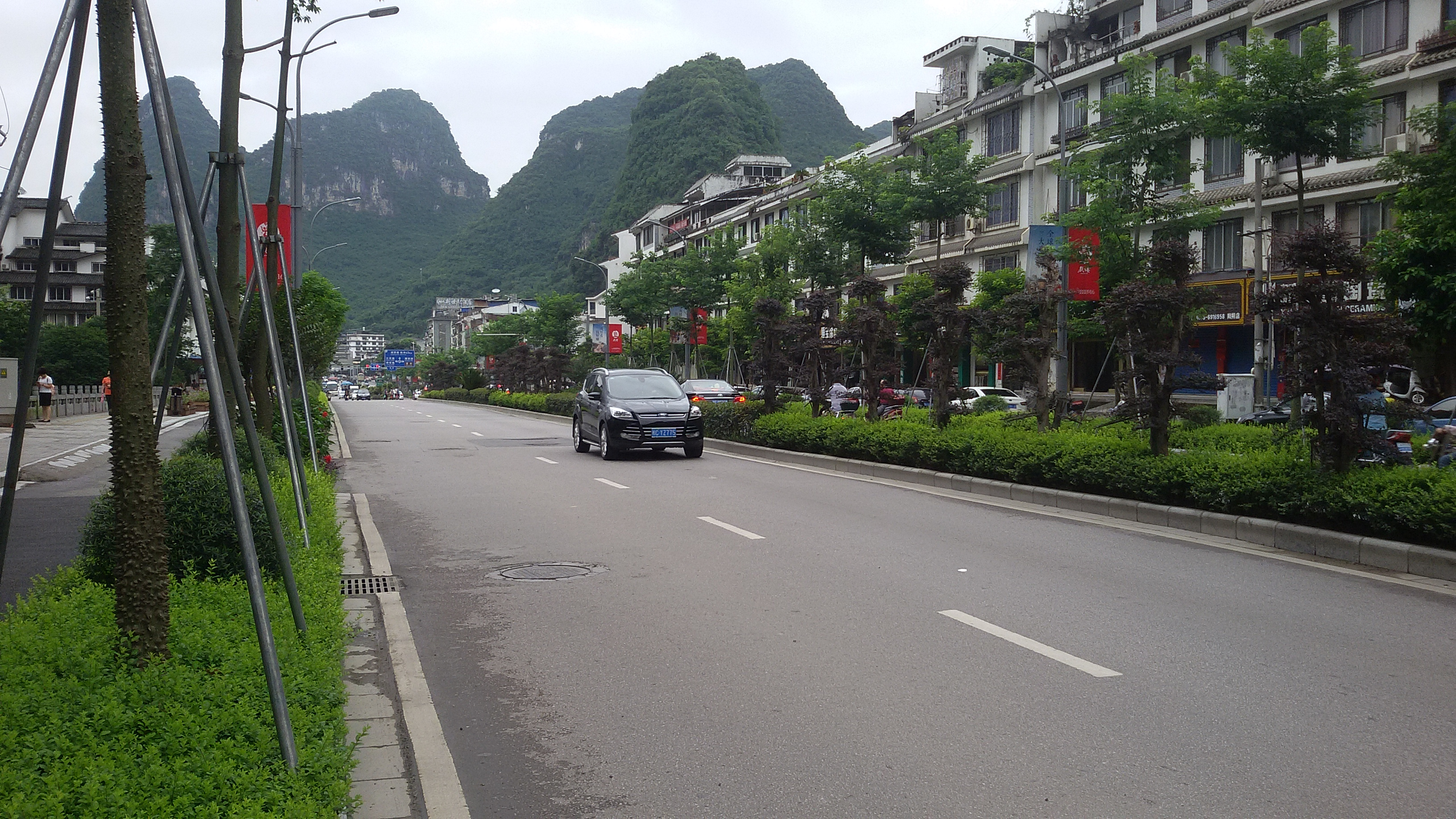 粵語: 321國道嘅桂林陽朔城區路段